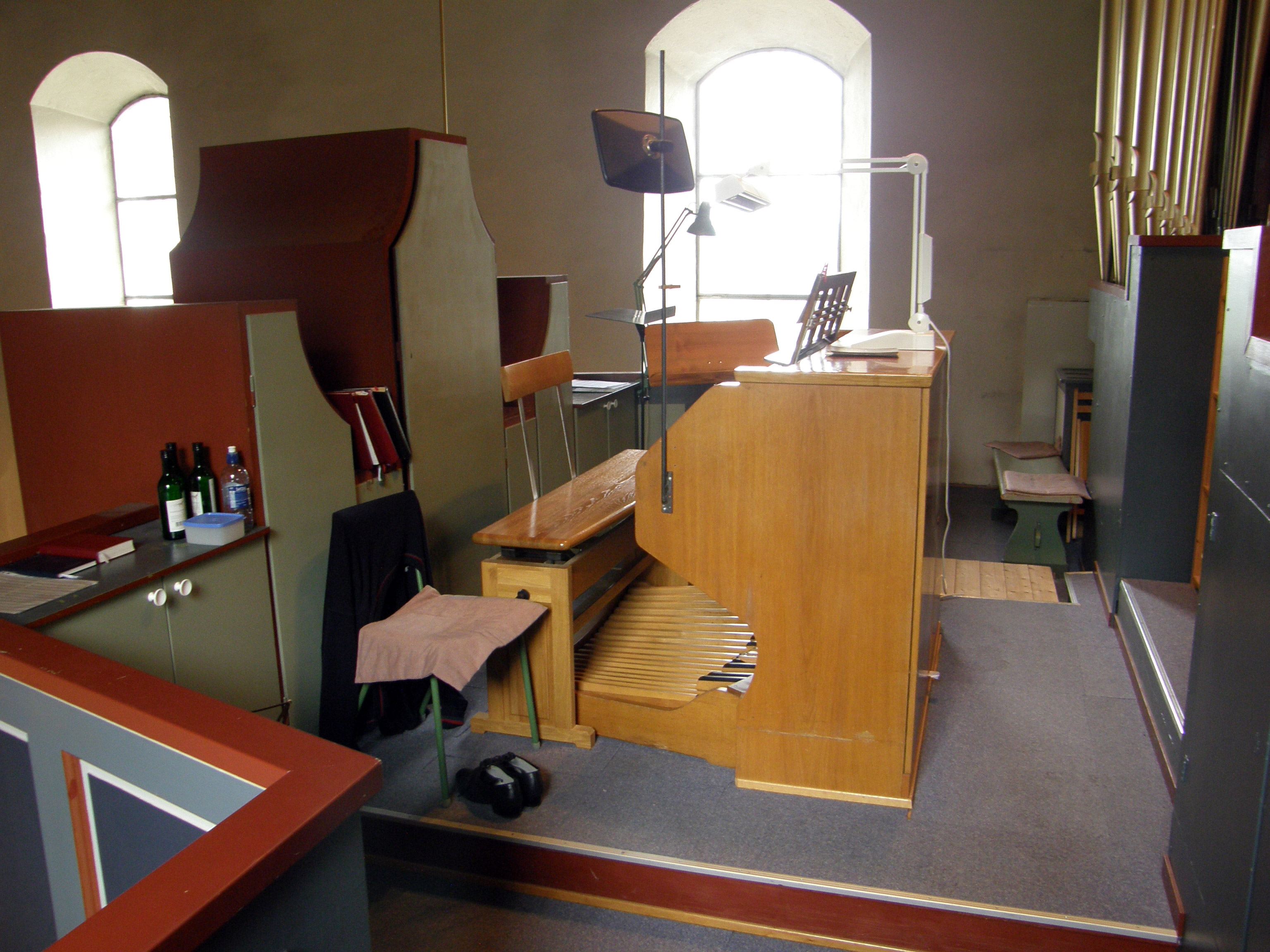 Norderhov kirke (orgelpult)